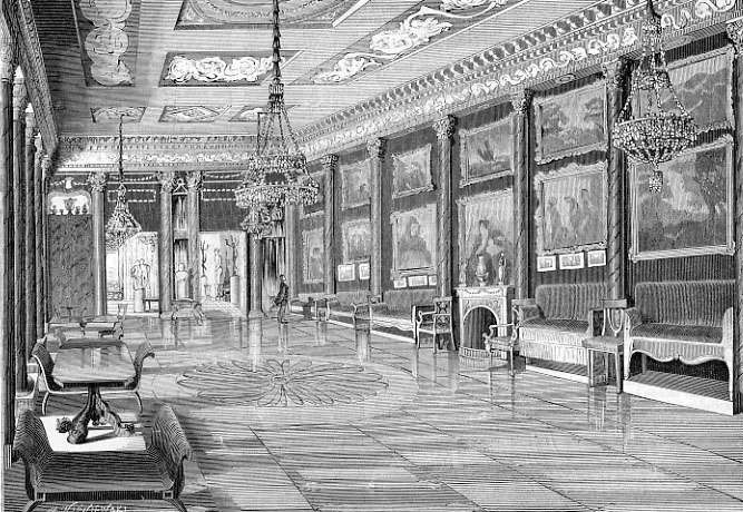 Золота зала палацу Ілінських у Романові.